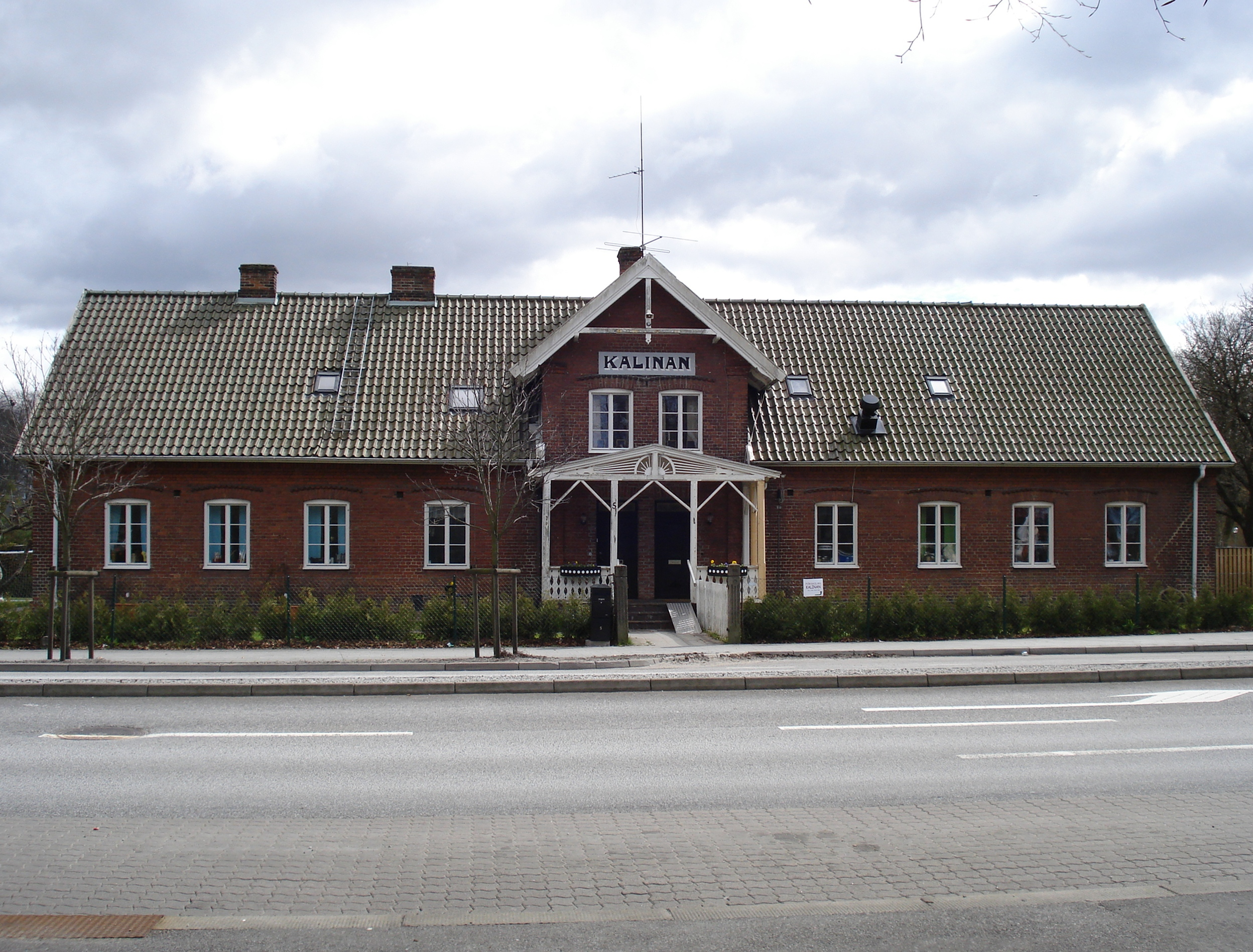 Arlöv. Kalinan. Byggt 1876. F.d. värdshus som numera blivit förskola.